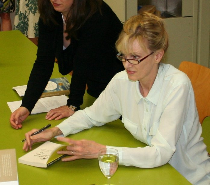 Autorin Siri Hustvedt nach einer Lesung aus ihrem Roman "Der Sommer ohne Männer" in der Heidelberger Ruprecht-Karls-Universität (Hörsaal 13)